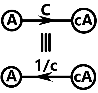 Ganho